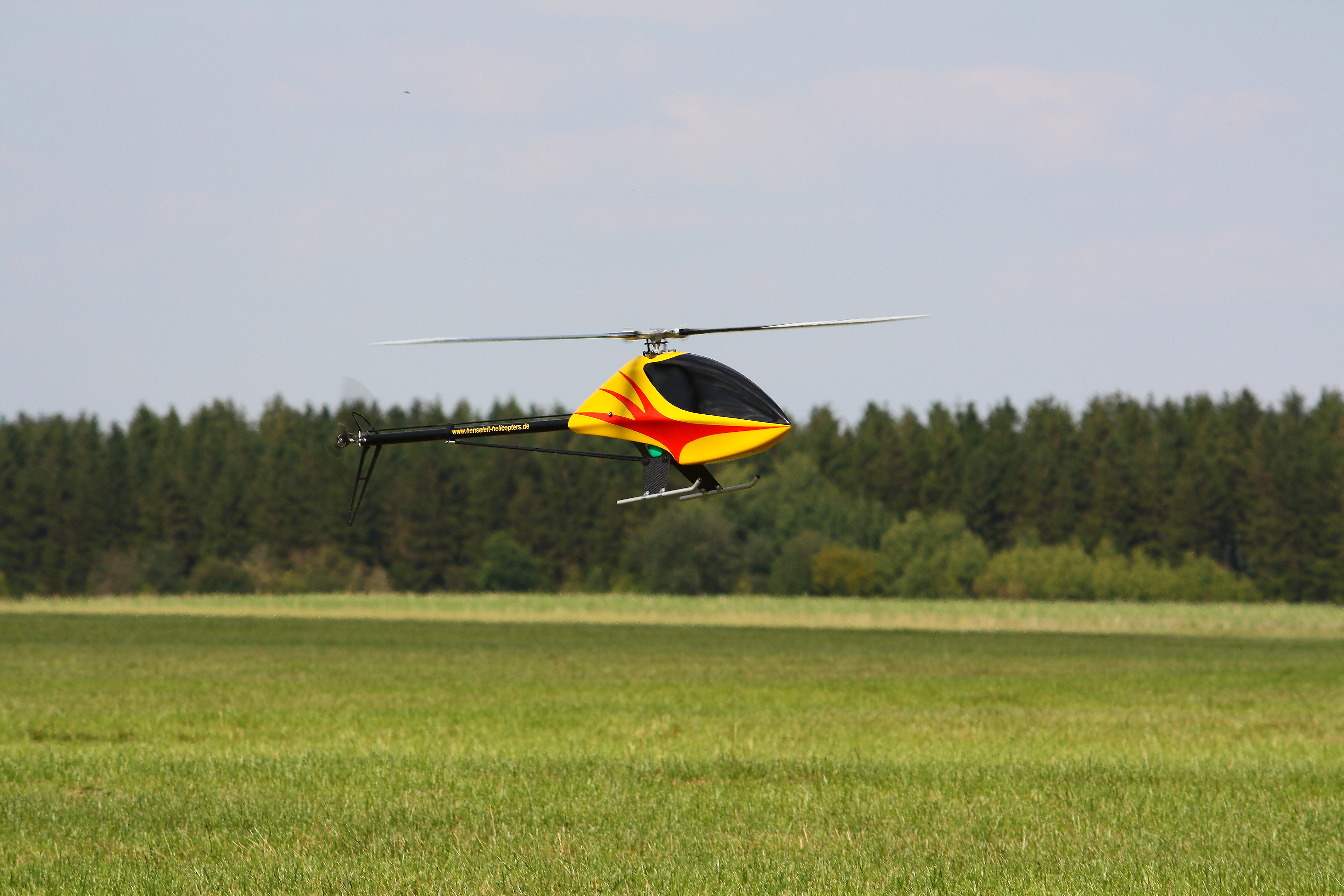 Landeanflug kurz vor dem Aufsetzen mit einem TDR-Henseleit RC-Helikopter